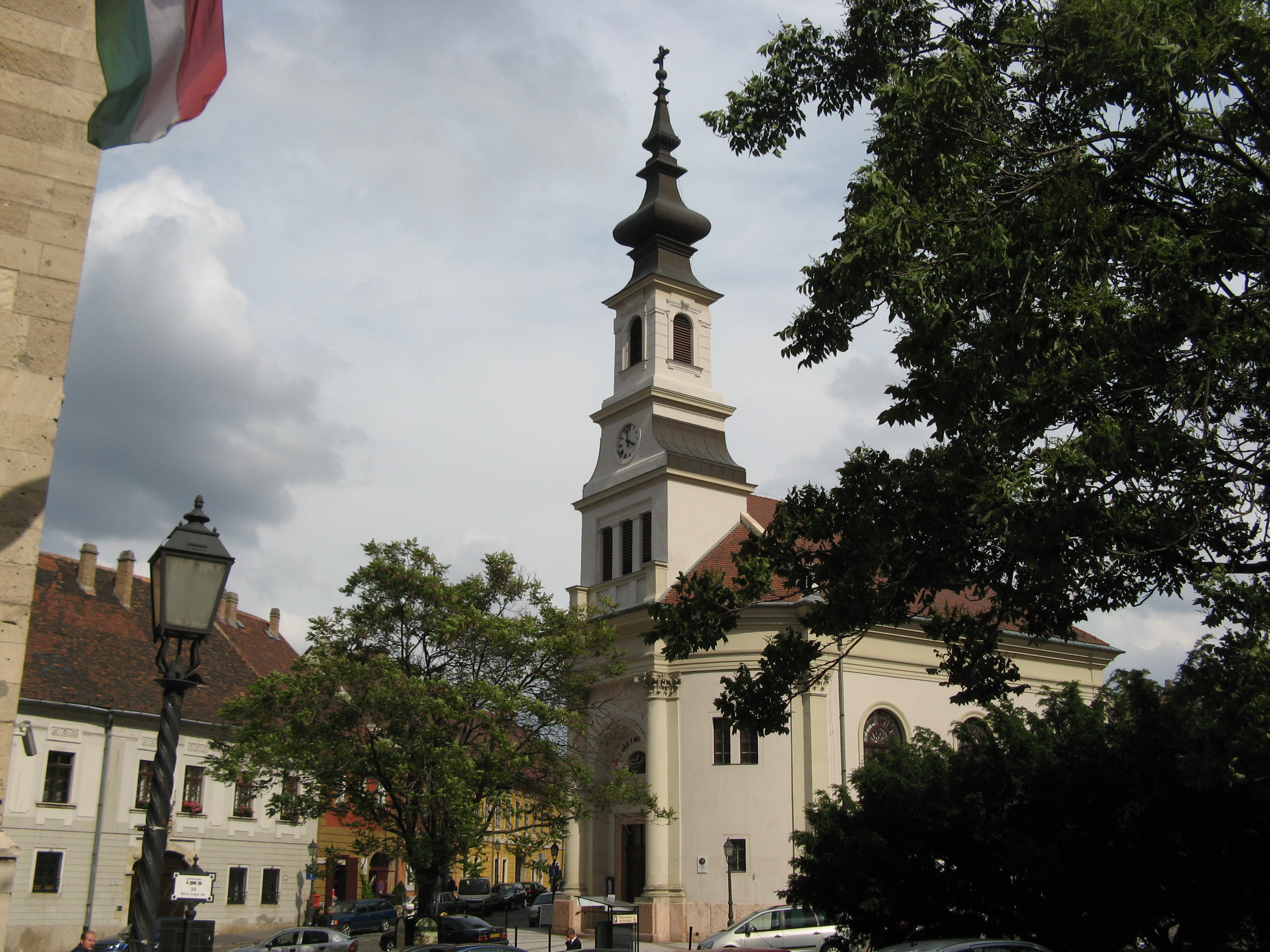 Evangelische Kirche im Burgviertel (1896), Bécsi kapu tér, Budapest I